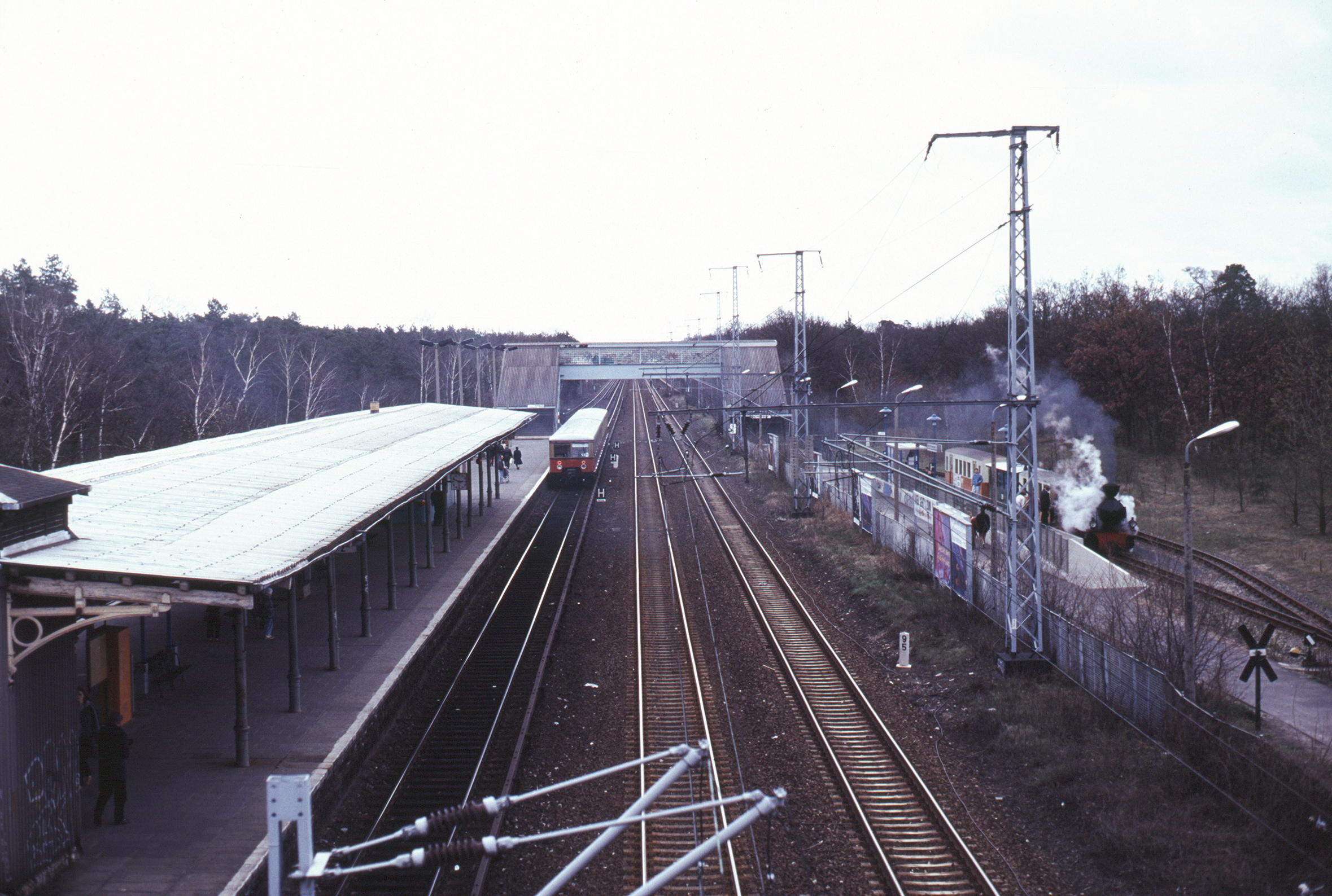 Bahnhof Berlin-Wuhlheide